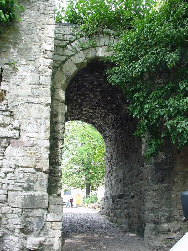 Eckardsburg - romanisches Kammertor zur Kernburg